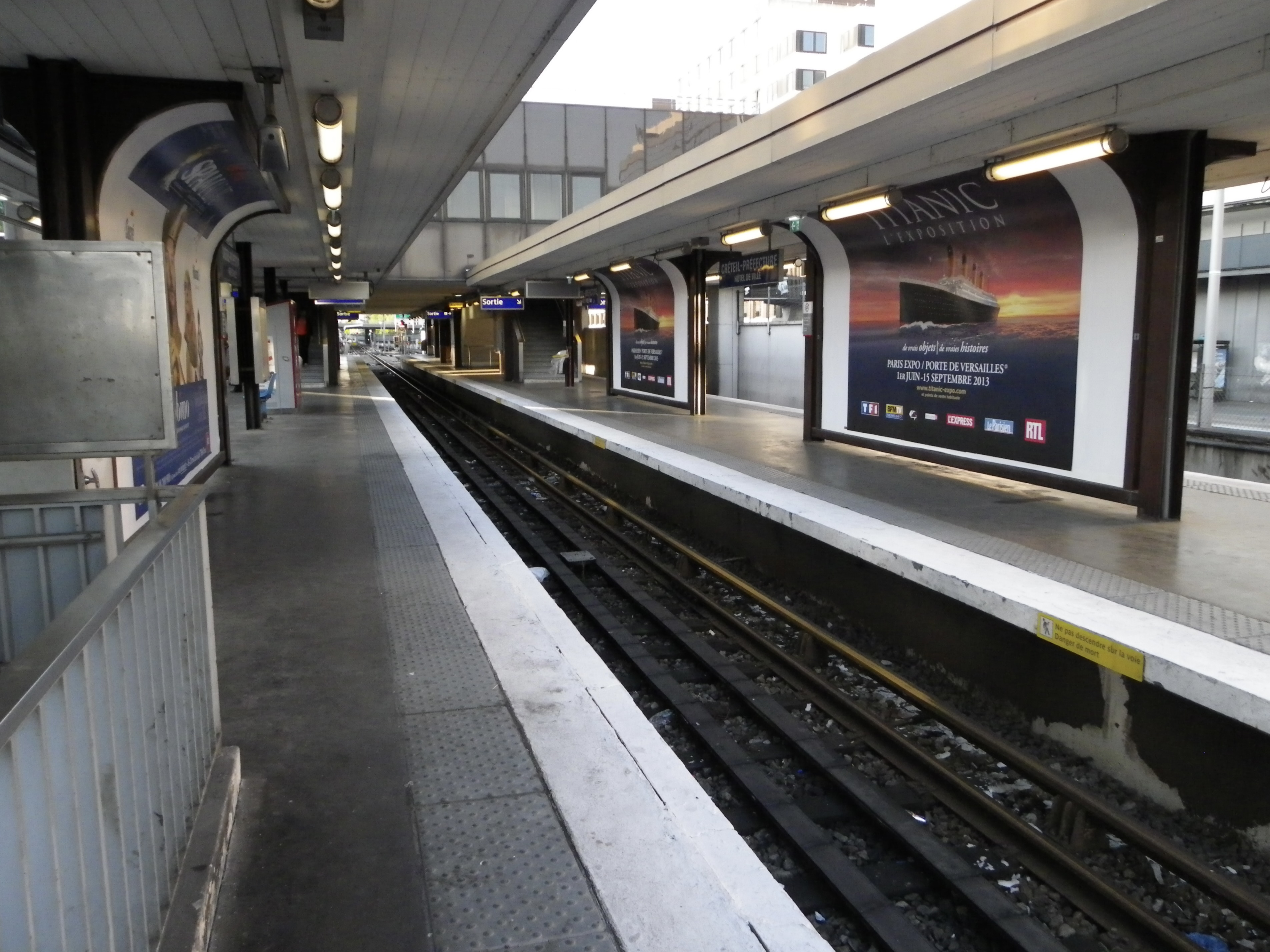 Quais de la station Créteil - Préfecture (Métro de Paris).